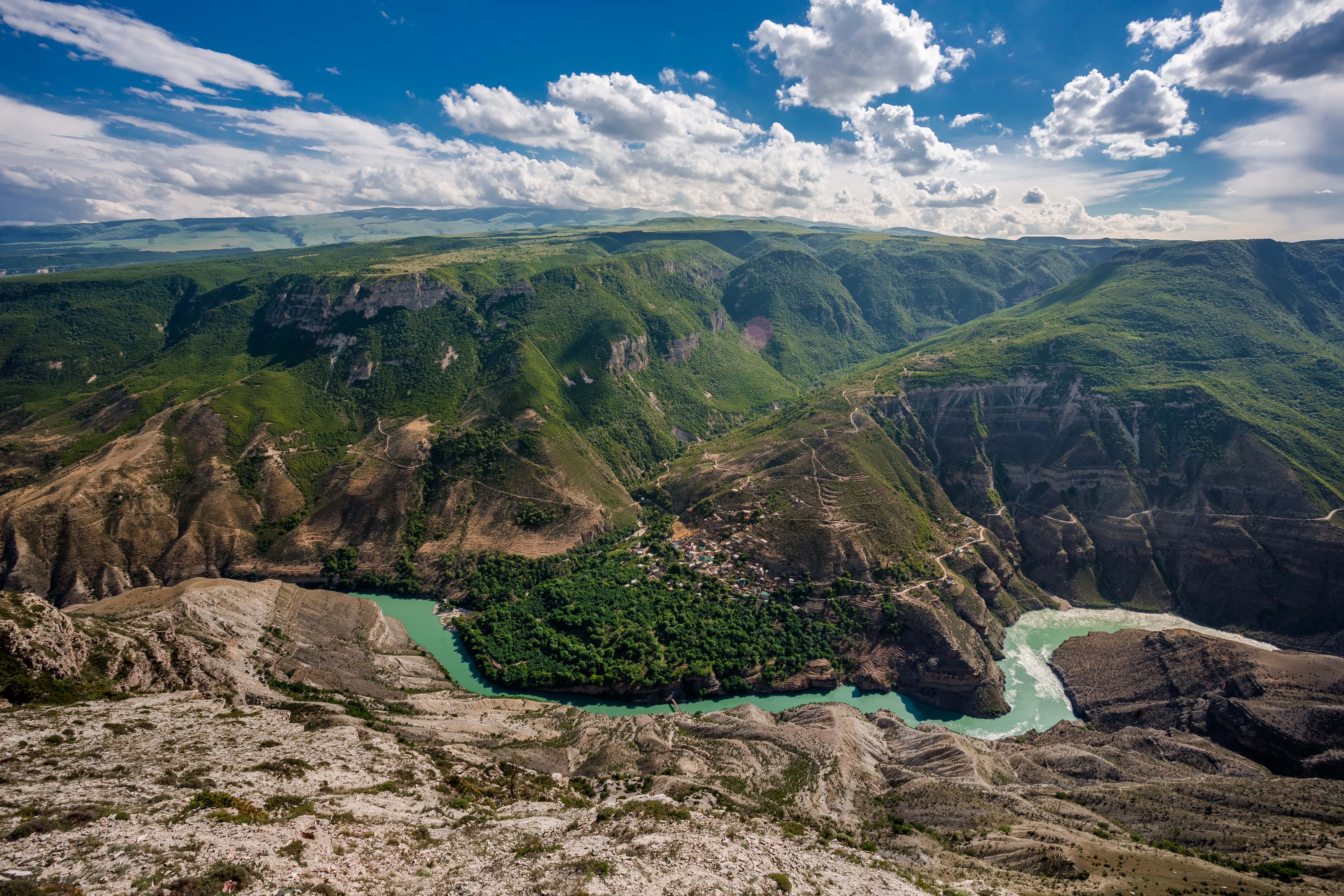 Сулакский каньон на р. Сулак в окрестностях пгт Дубки, Казбековский район, Дагестан